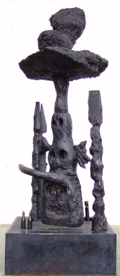 A. R. Penck: Future of the soldiers (1995) Bronzeplastik vor dem Kunstmuseum Bonn – 2011 entfernt Sammlung Ströher (ehemals Sammlung Grothe)